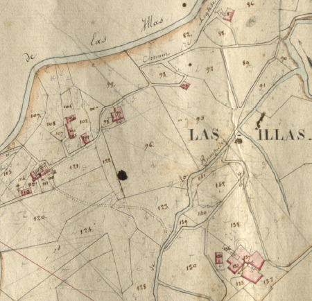 Les Illes en el Cadastre napoleònic del 1812 (Arxius Departamentals dels Pirineus Orientals)